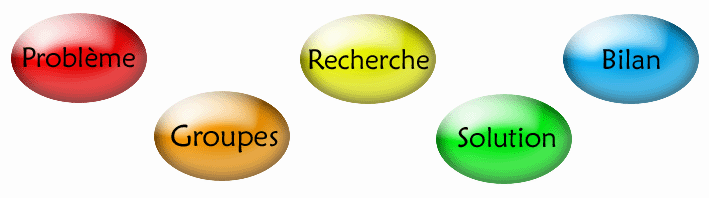 Schéma Apprentissage par Problèmes